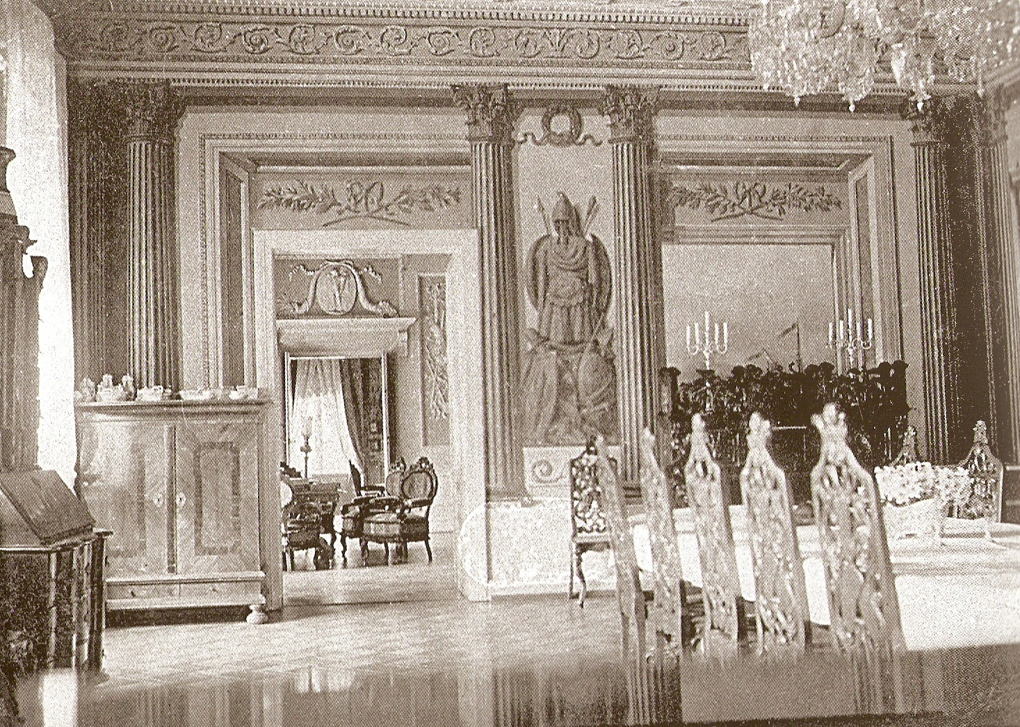 Sala balowa Muzeum: Zespołu Pałacowo-Parkowego w Dobrzycy.